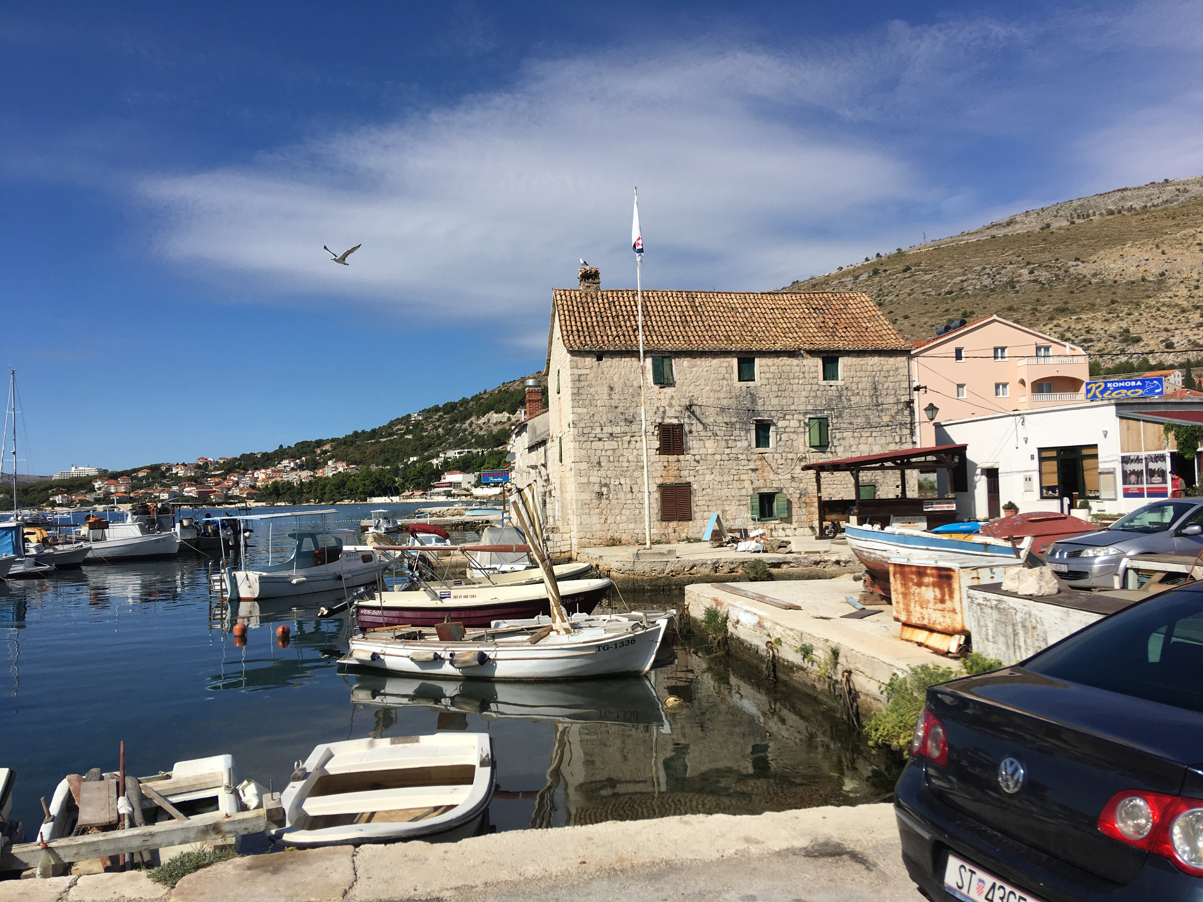 Kulturno-povijesna cjelina Seget Donji